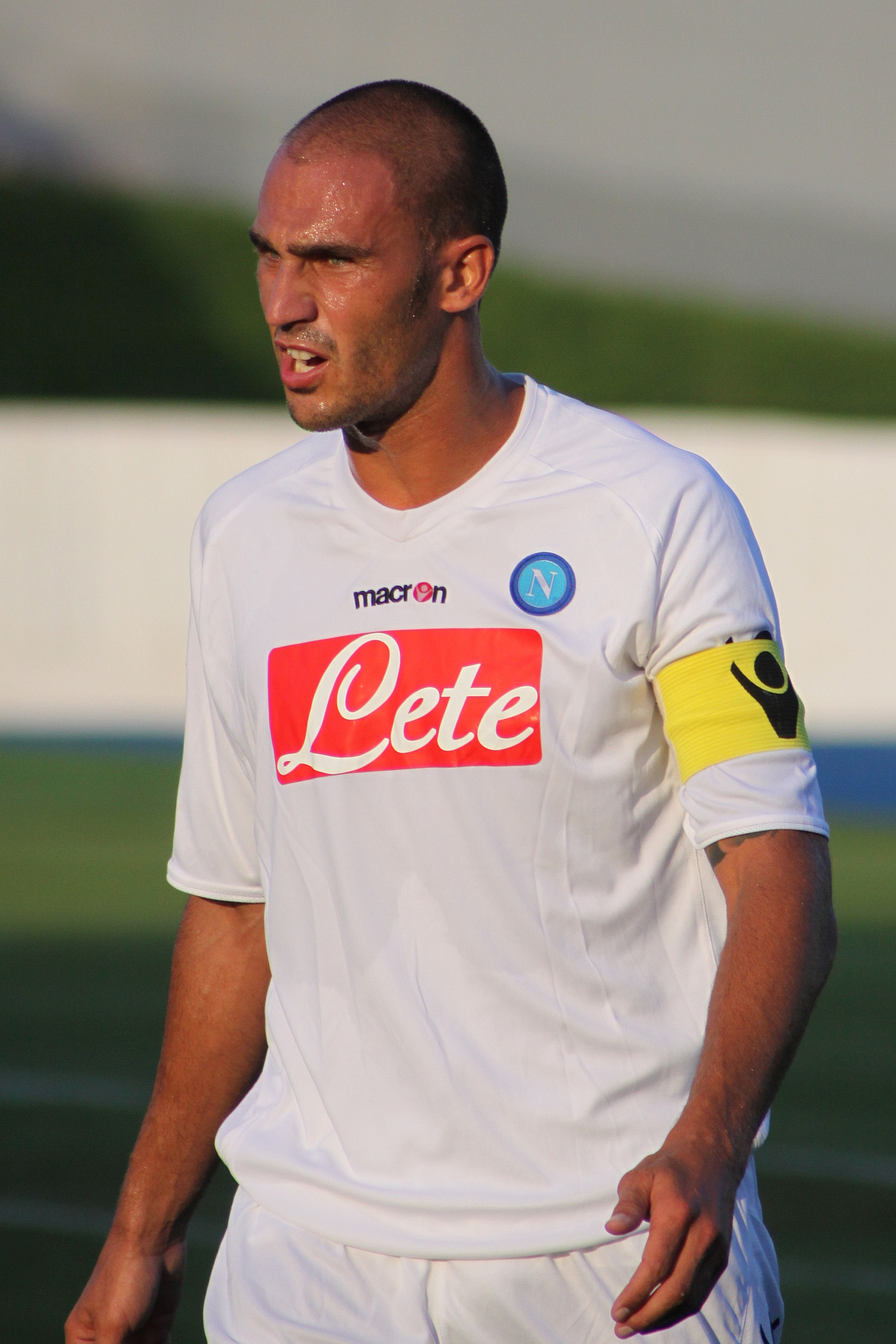 Paolo Cannavaro - SSC Neapel (4) Paolo Cannavaro - Società Sportiva Calcio Napoli